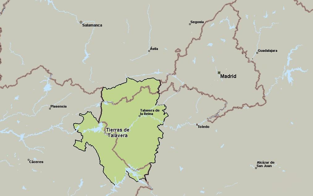 Los municipios que conforman las tierras de Talavera